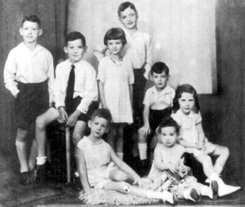 2. von links: Herbert Loebl (1923–2013), 2. von rechts: Lili Loebl (* 1930) und ganz rechts: Hanna Loebl (1926–2009). Die Schreibweise des Familiennamens war urspünglich Löbl und wurde nach der Emigration in Loebl geändert, bei weiteren Verwandten auch zu Lobl bzw. Loble.